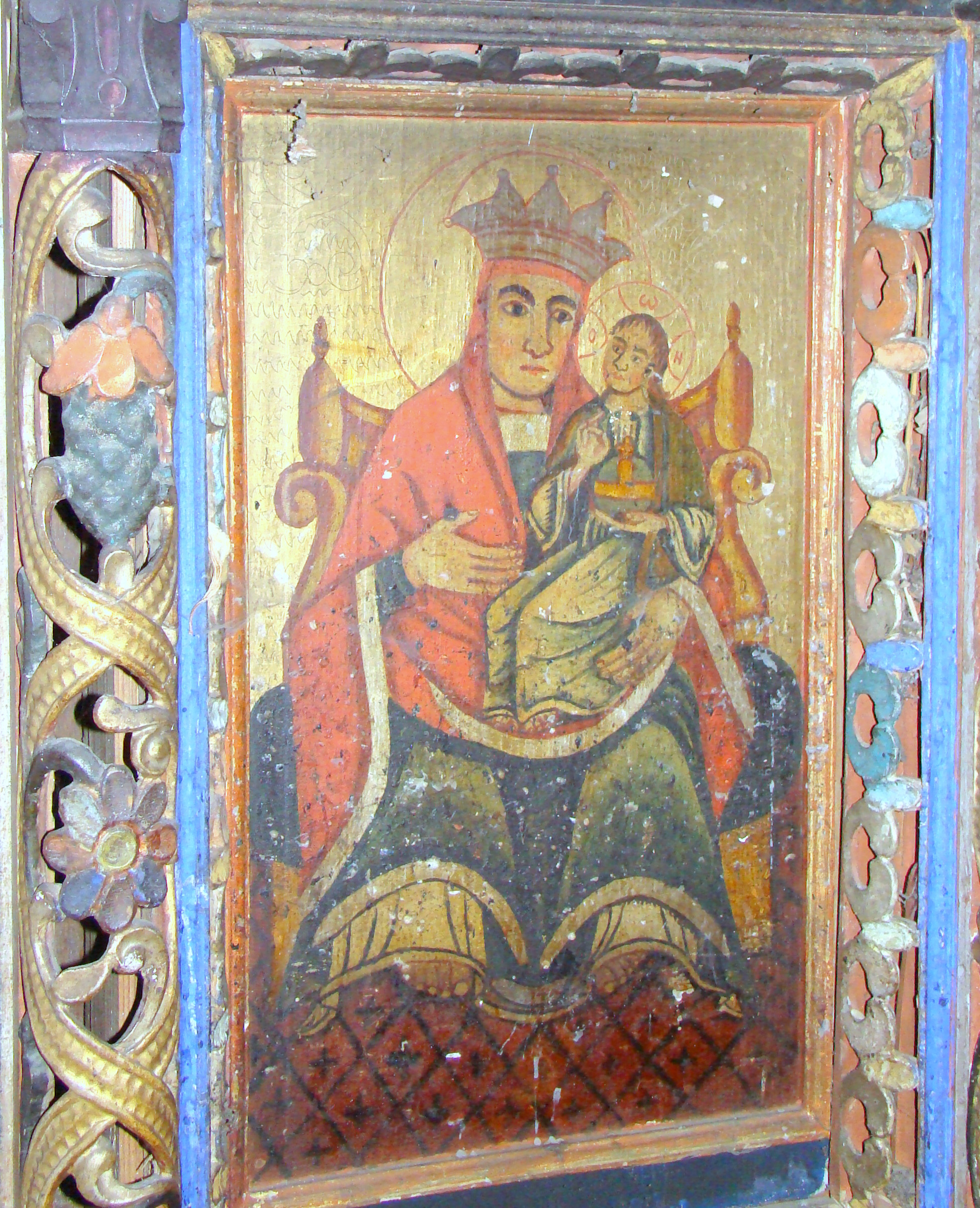 Biserica de lemn „Sf. Arhangheli Mihail și Gavril”